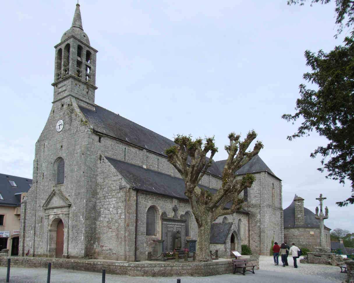 Photo prise par moi-même en mai 2006